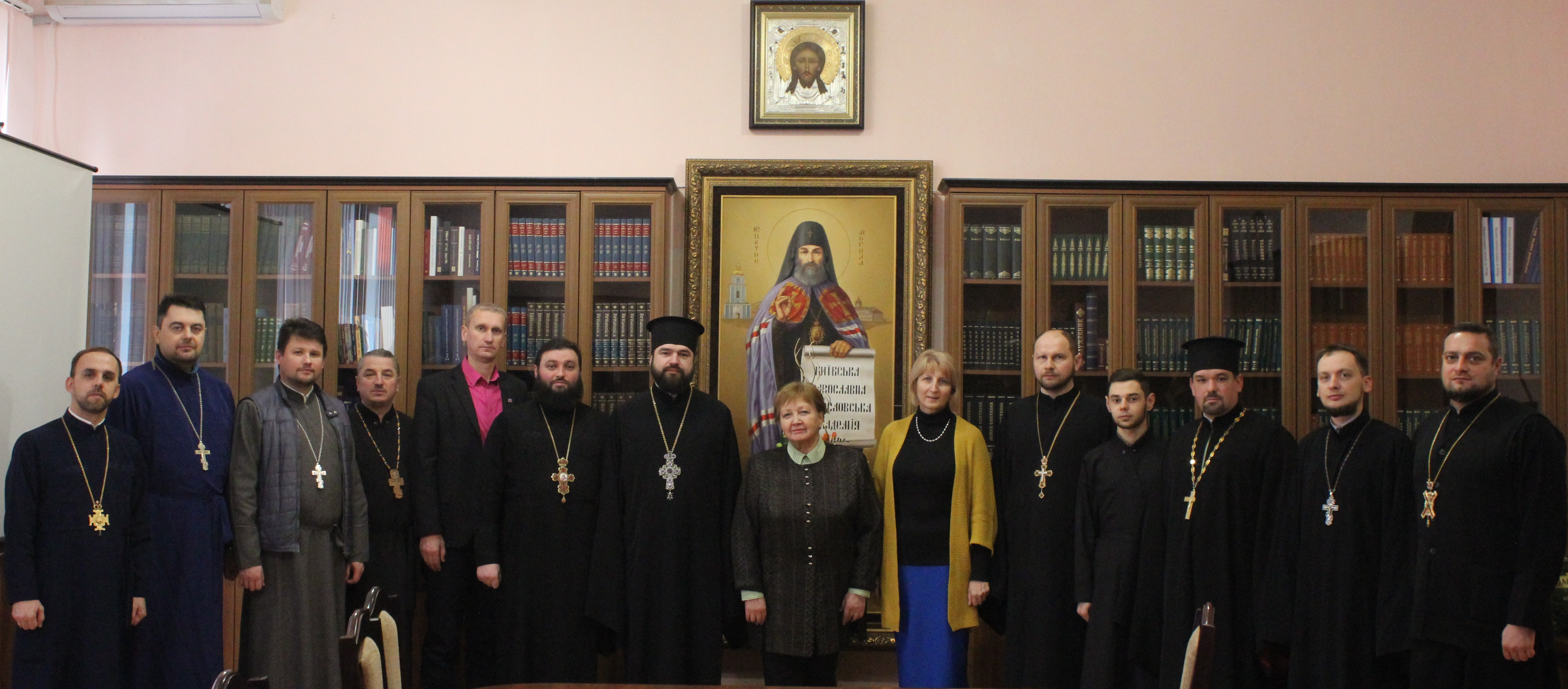 Фото учасників третього дня циклу семінарів «Медичне капеланство і паліативна допомога», що відбувся у залі засідань вченої ради Київської православної богословської академії 11 грудня 2019 року: зліва направо: о. Павло Мельник, о. Анатолій Полігас, о. Сергій Кирилюк, о. Дмитро Поворотний, п. Сергій Гаврюк, о. Феогност Бодоряк, о. Олександр Трофимлюк, Людмила-Оксана Андріїшин, Галина Філатова, о. Віталій Клос, Іван Данилів, о. Назар Бабій, о. Олексій Окремов, о. Сергій Крамаренко. Фото використано